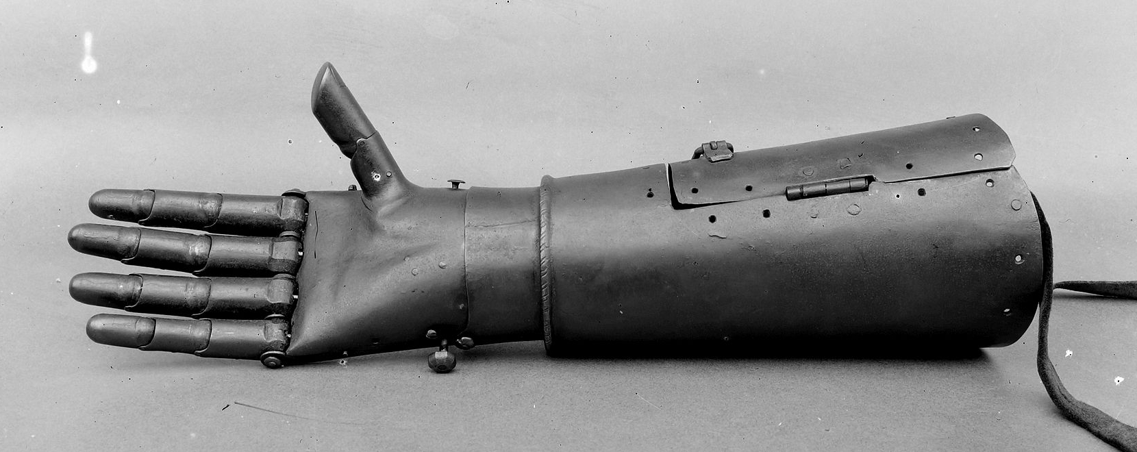 Jüngere Eiserne Hand des Ritters Götz von Berlichingen, um 1530, Museum der Burg Jagsthausen. Glasnegativ von Wilhelm Kratt (1887–1968).